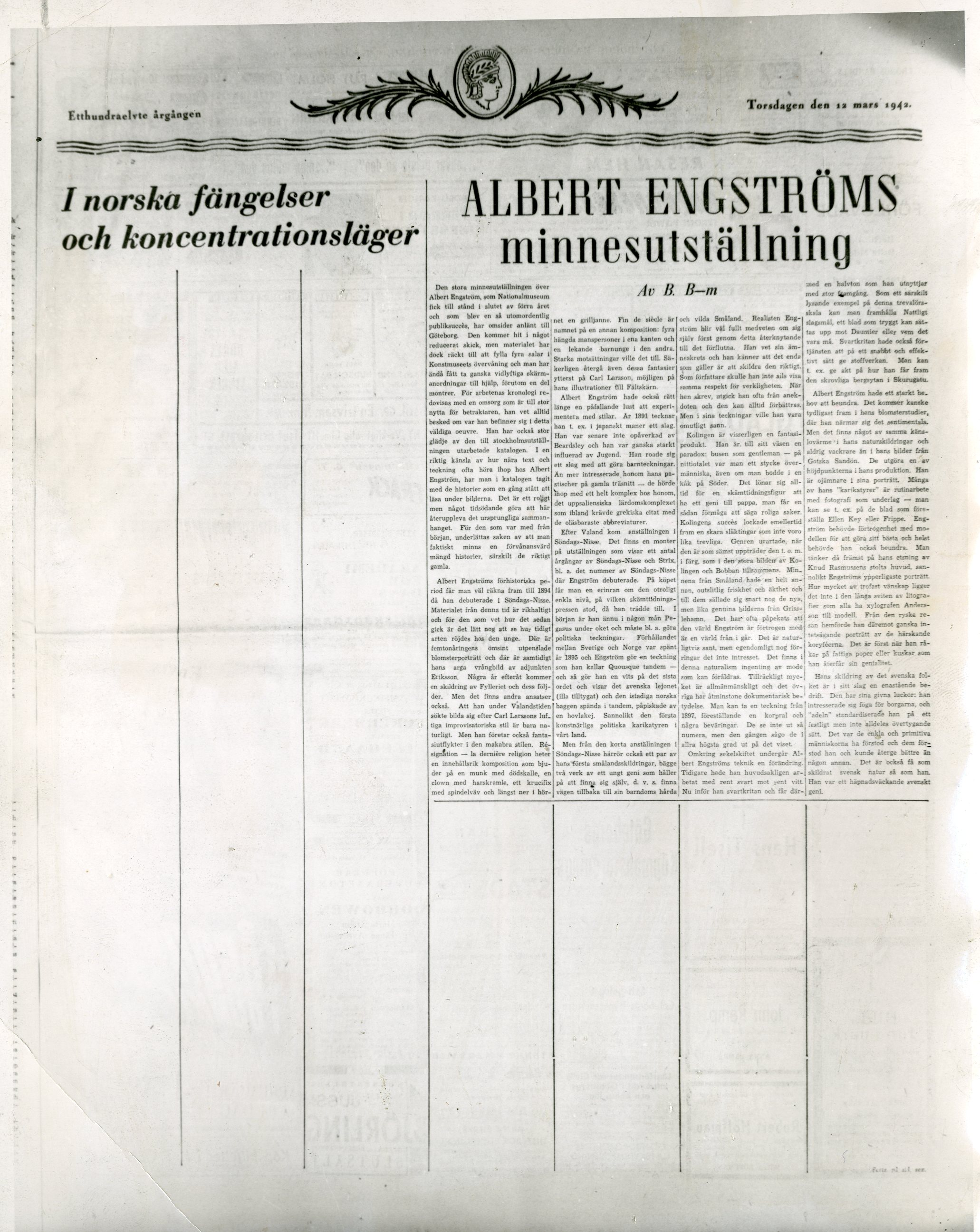 Göteborgs Handels- och Sjøfarts-Tidning den 12. mars 1942. Det er artiklen om tyskernes behandling av nordmenn i fengsler og konsentrasjonsleire som er strøket av den svenske sencuren. RA/PA-1209/Uc/66/7/S 1004